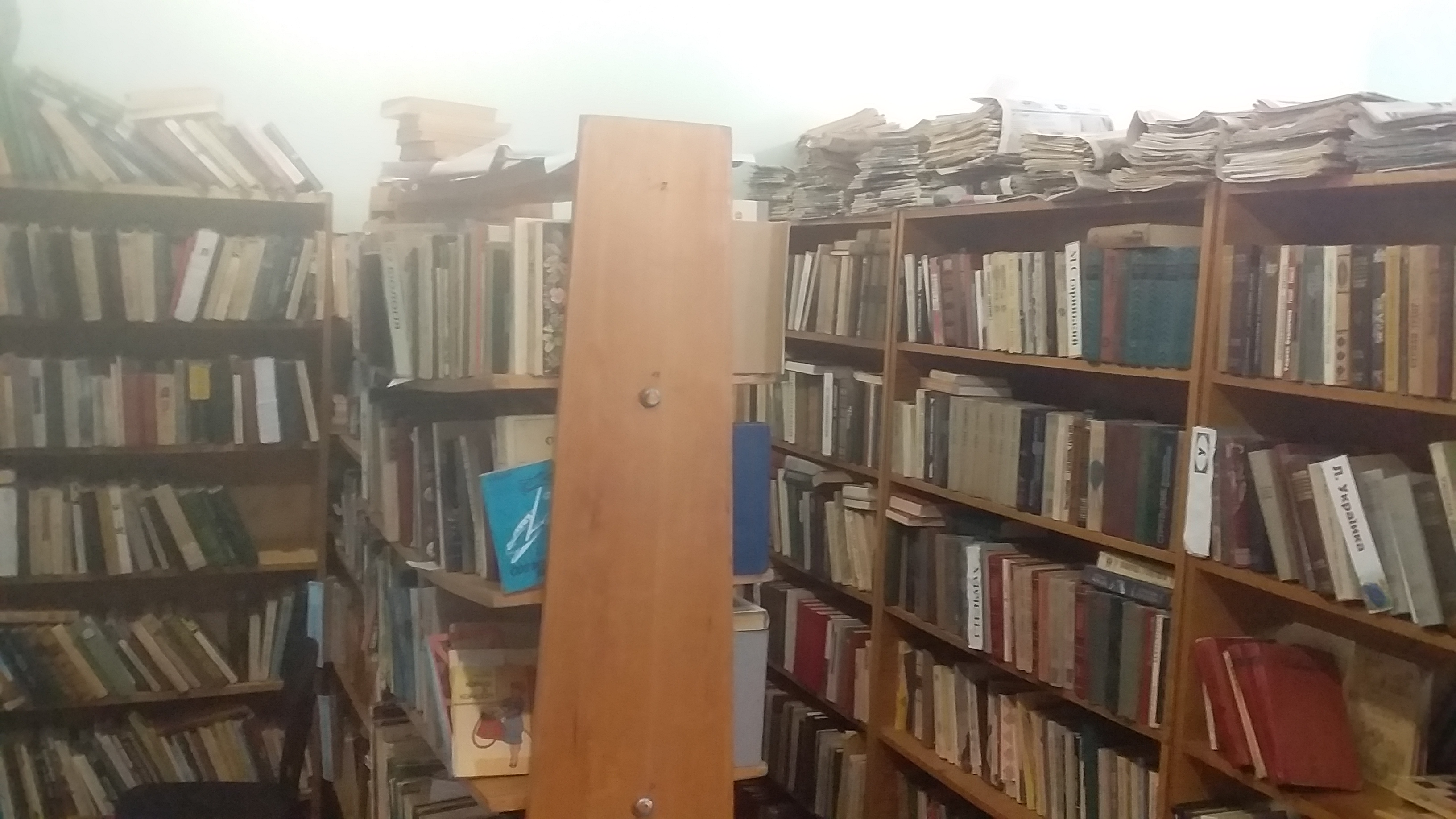 Приміщення книгосховища бібліотеки-філії №9 Хмельницької міської ЦБС з книгами